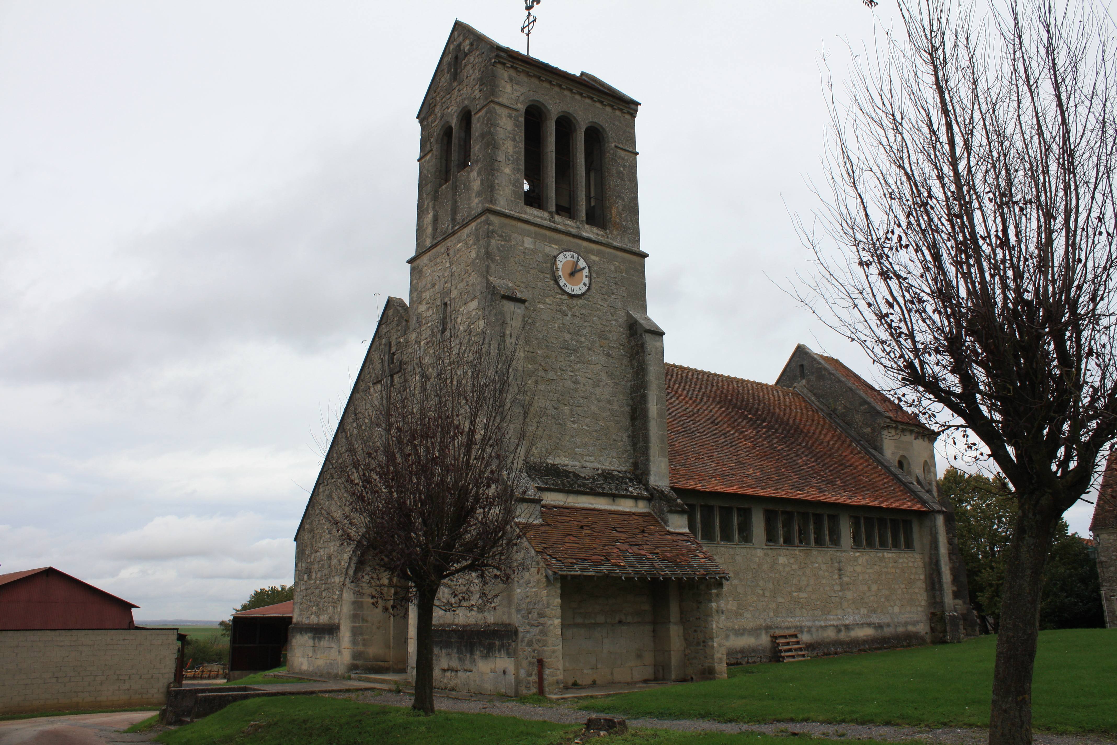 Église Saint-Rémi d'Hautevesnes